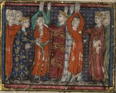 Adoubement des futurs Philippe V le Long et Charles IV le Bel en 1313. La cérémonie est présidée par Philippe IV le Bel, Louis Ier de Navarre et Édouard II d'Angleterre.